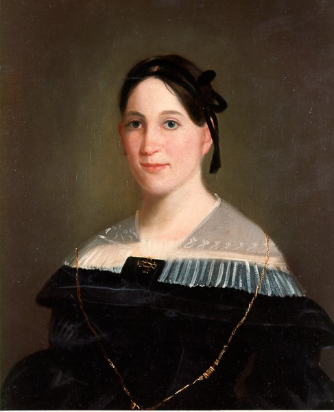 Miss Firmin Rene Desloge (Cynthian MacIlvaine)